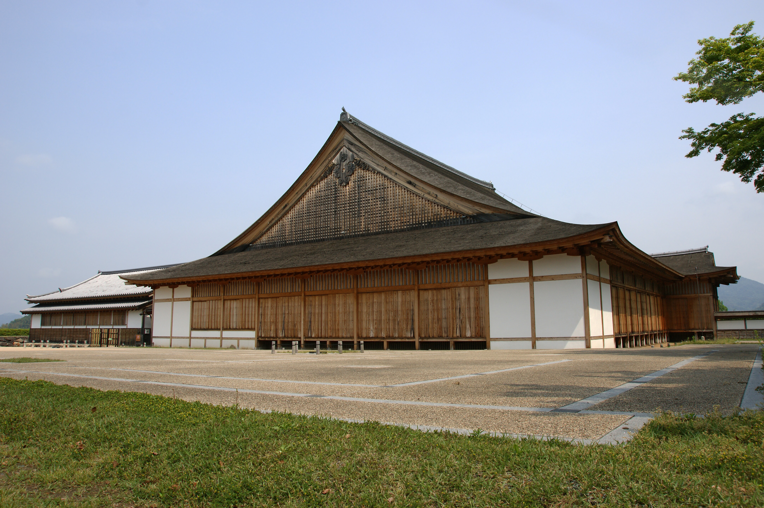 Sasayama Castle in Sasayama, Hyogo prefecture, Japan